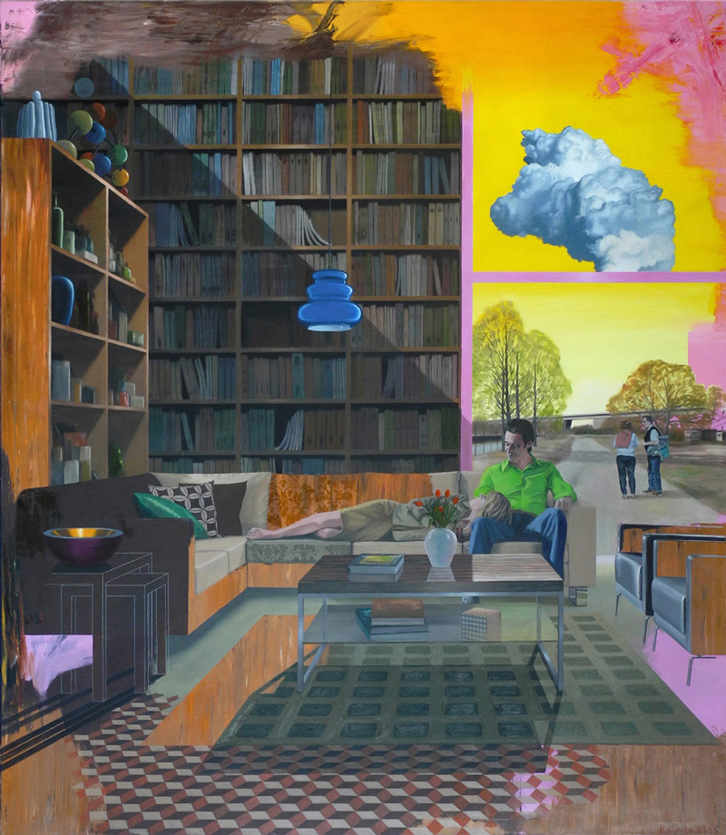 Ölbild von Hermann Reimer, 2010